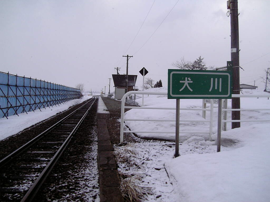 犬川駅ホーム。旅行中本人撮影。